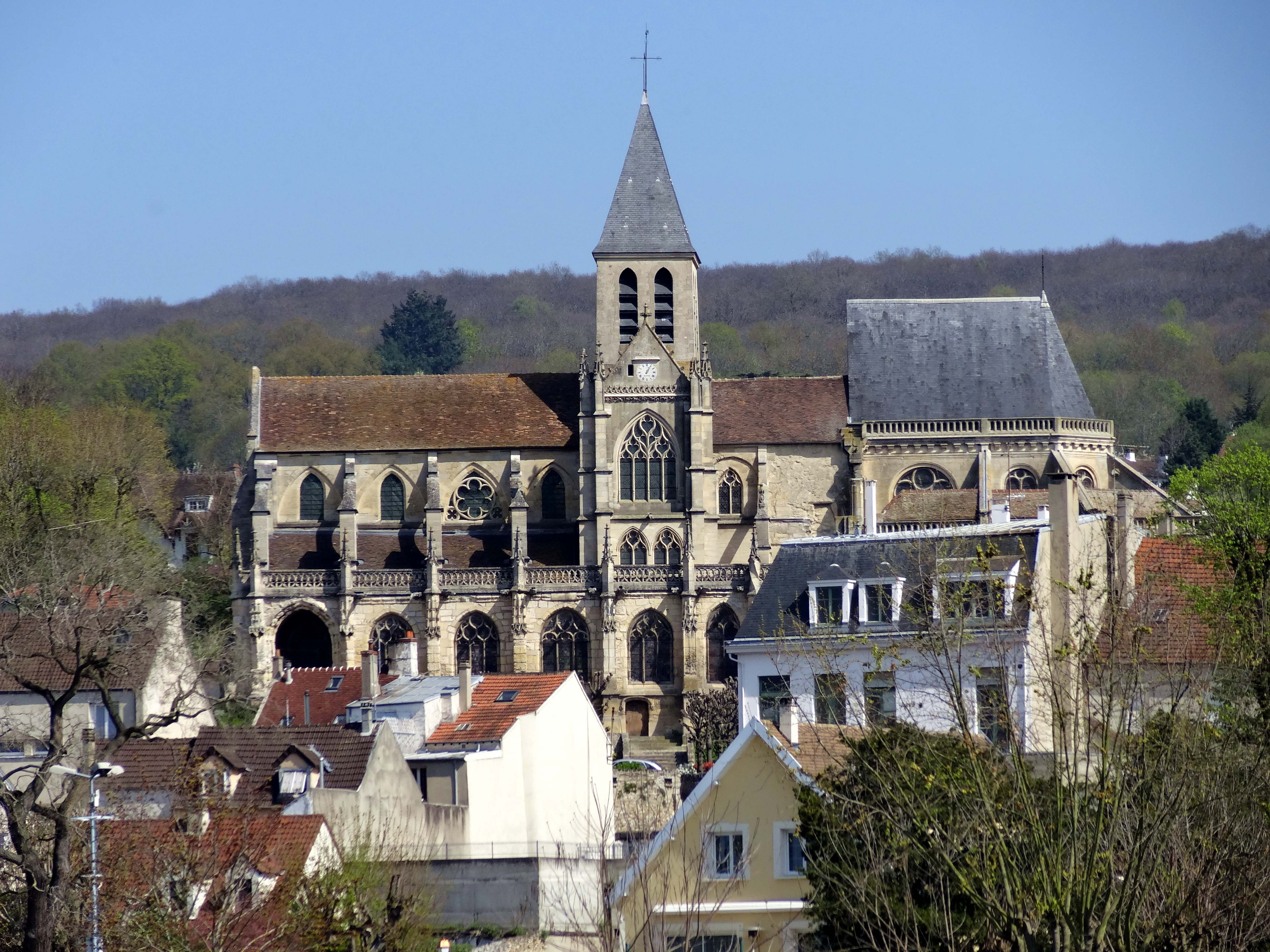 Église Saint-Martin, vue depuis la rive gauche de la Seine.